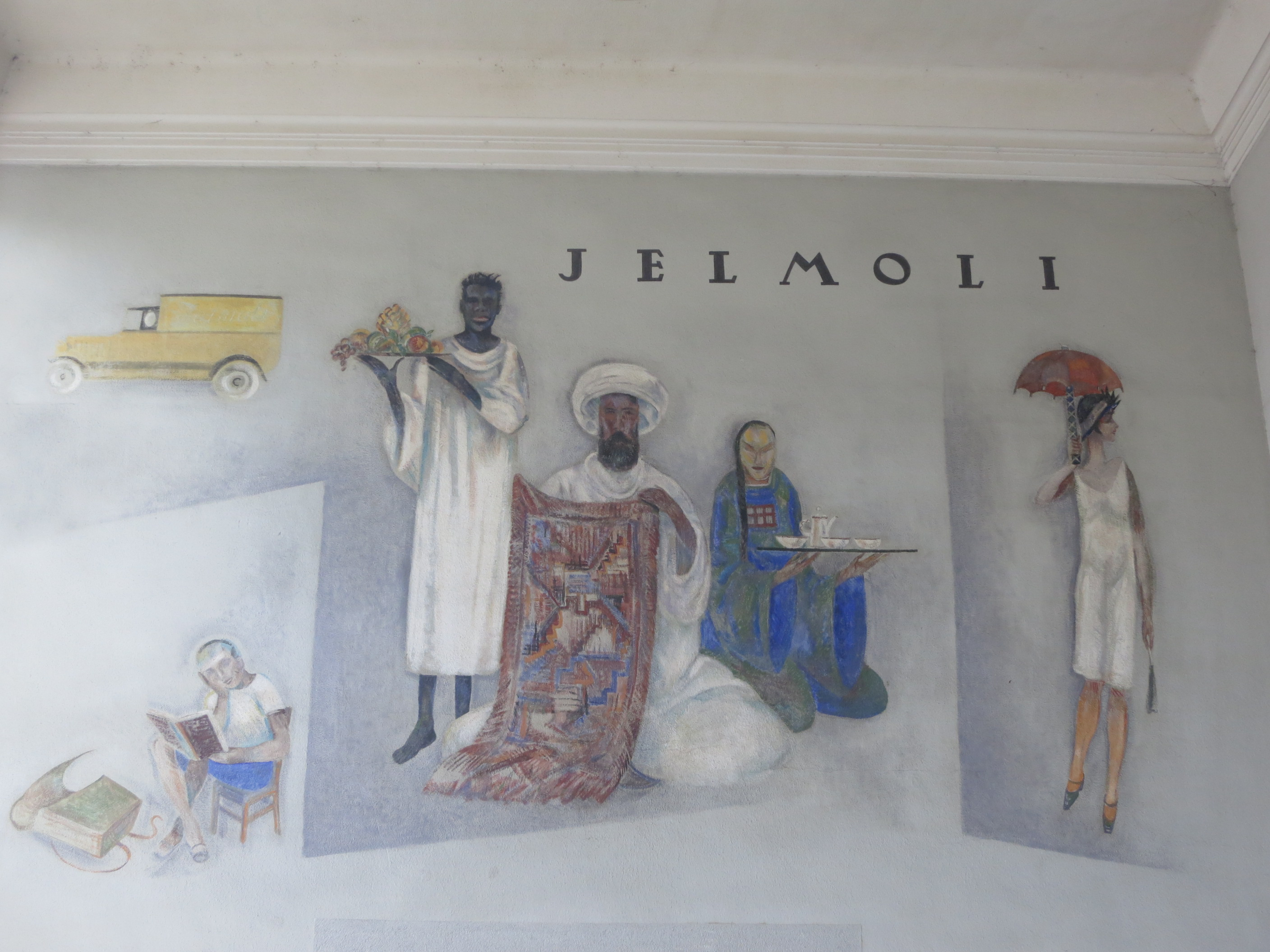 Wandmalerei Otto Baumberger 1926, Bahnhofshalle, Zürich-Wiedikon, Schweiz